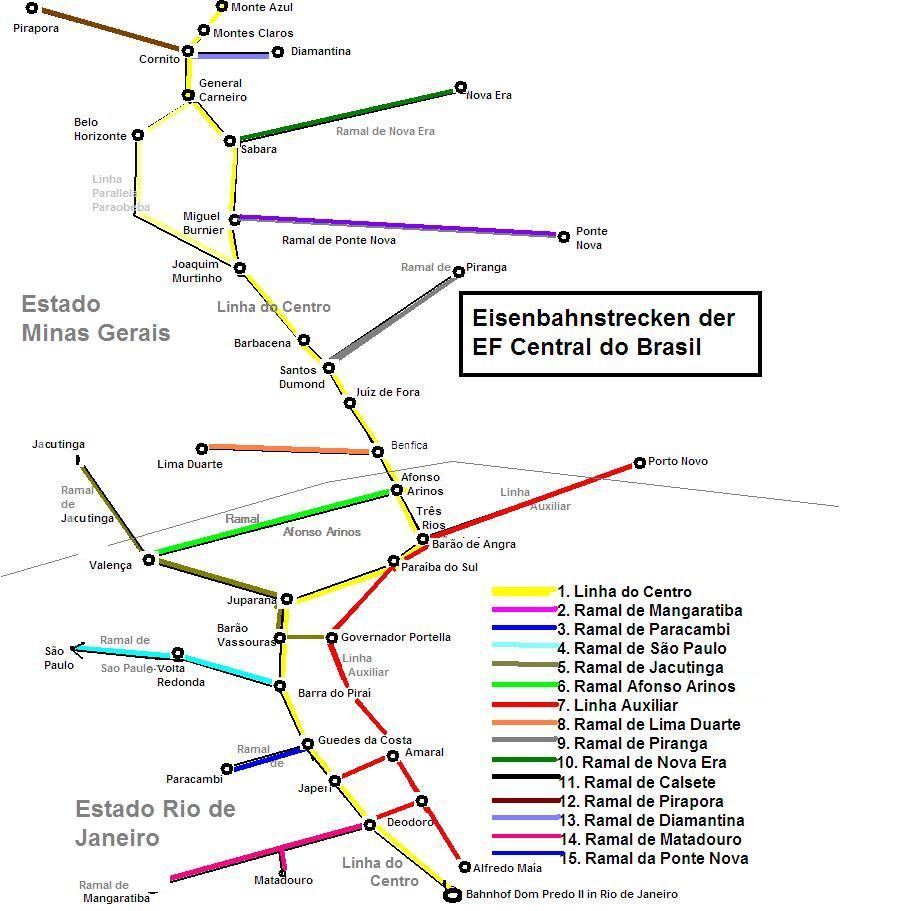 Karte der historischen Bahnstrecken der E.F. Central do Brasil